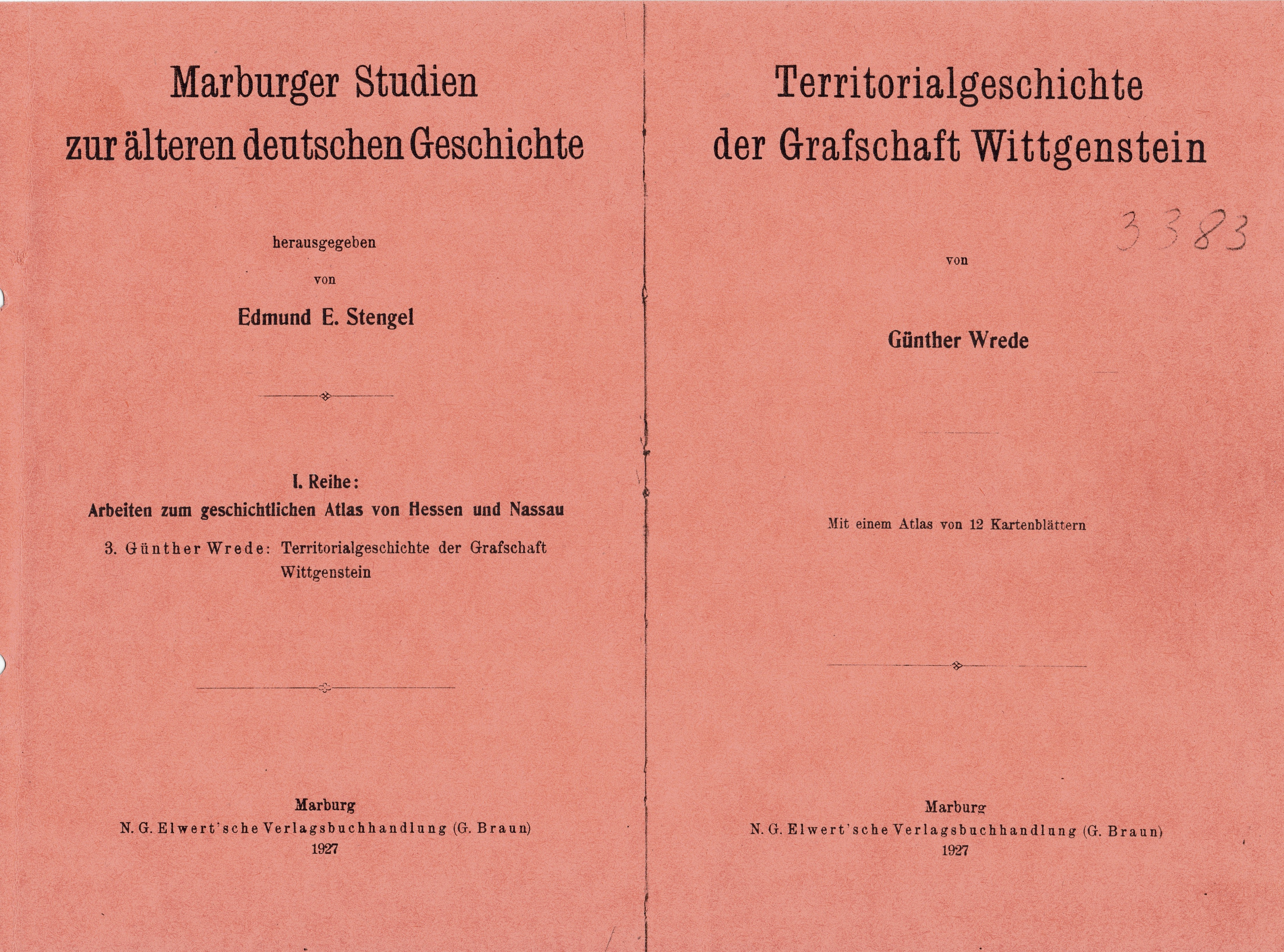 Deckblatt der Dissertation Günther Wrede, gedruckt 1925.